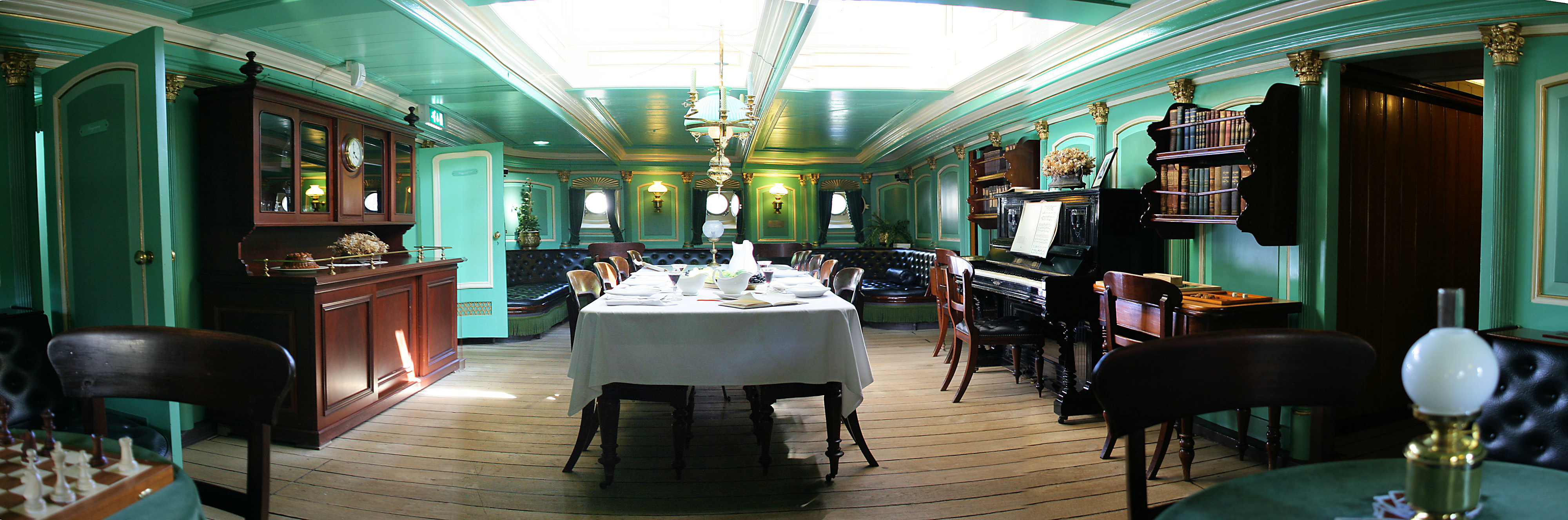 Longroom Buffel (Interieur) Maritiem Museum - longroom in museumschip 'De Buffel' - panoramafoto